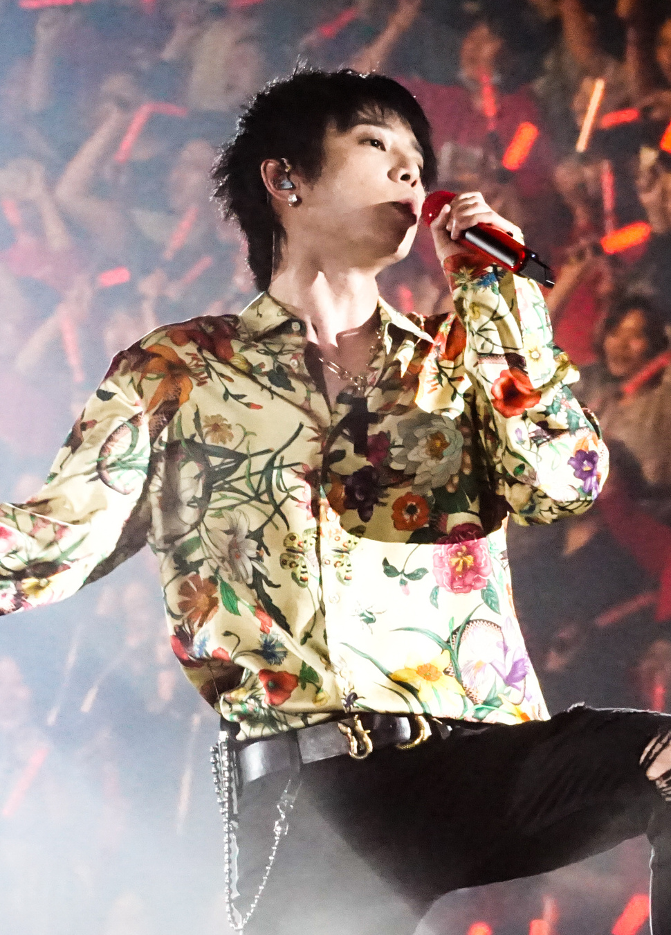 华晨宇 2017火星 演唱会